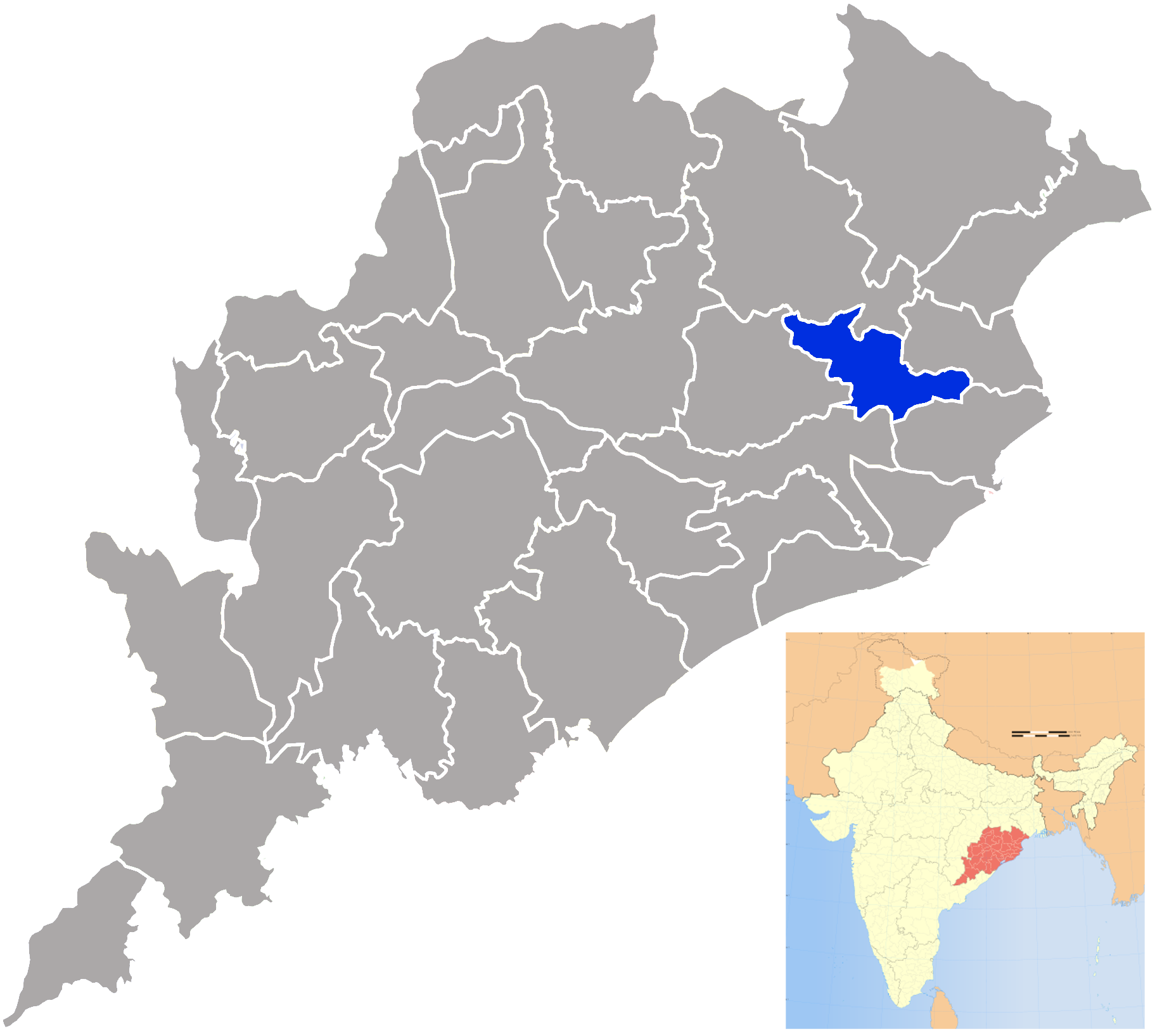 Distrito de Jajapur en Orissa